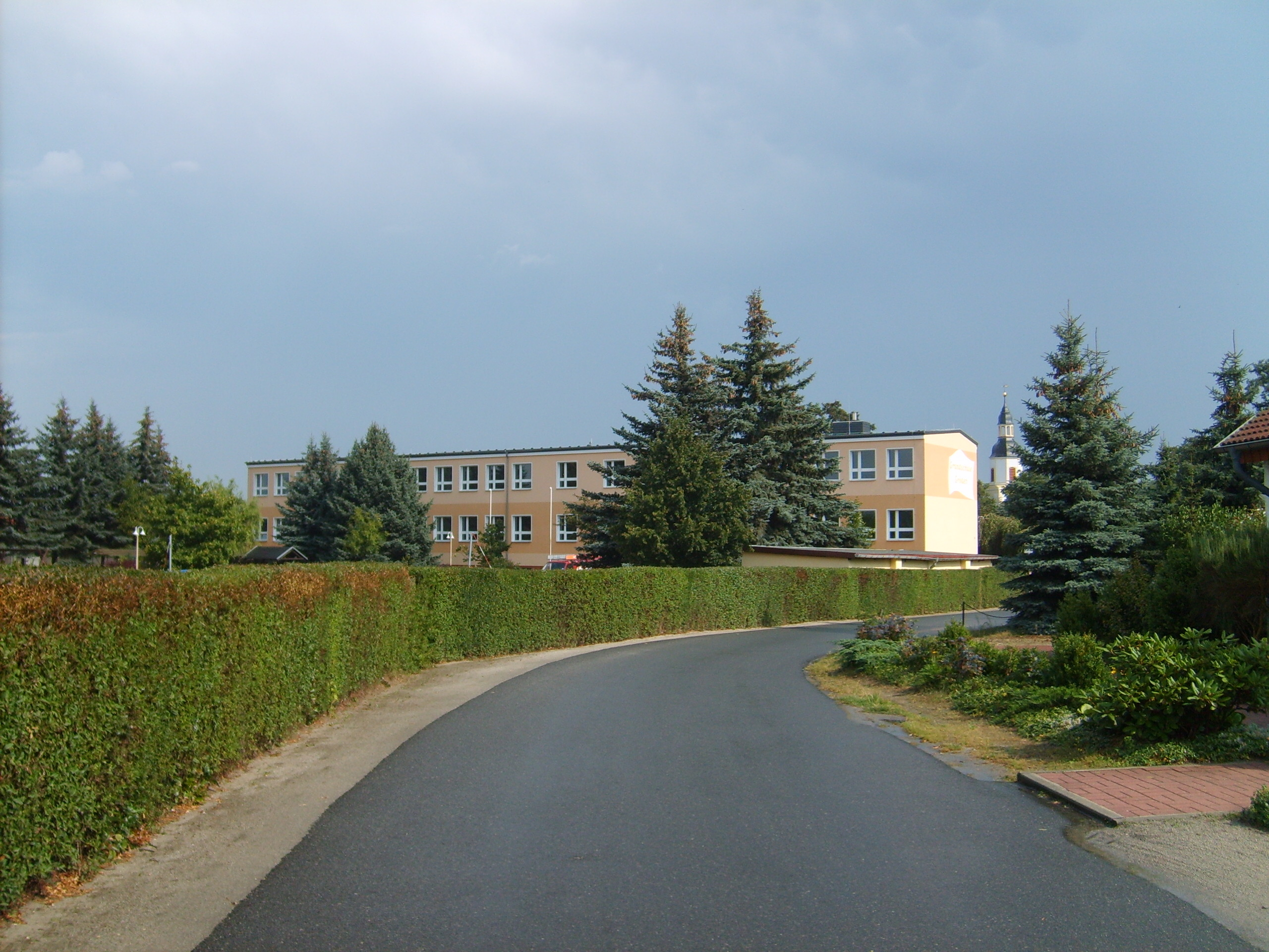 Gröden -Grundschule.